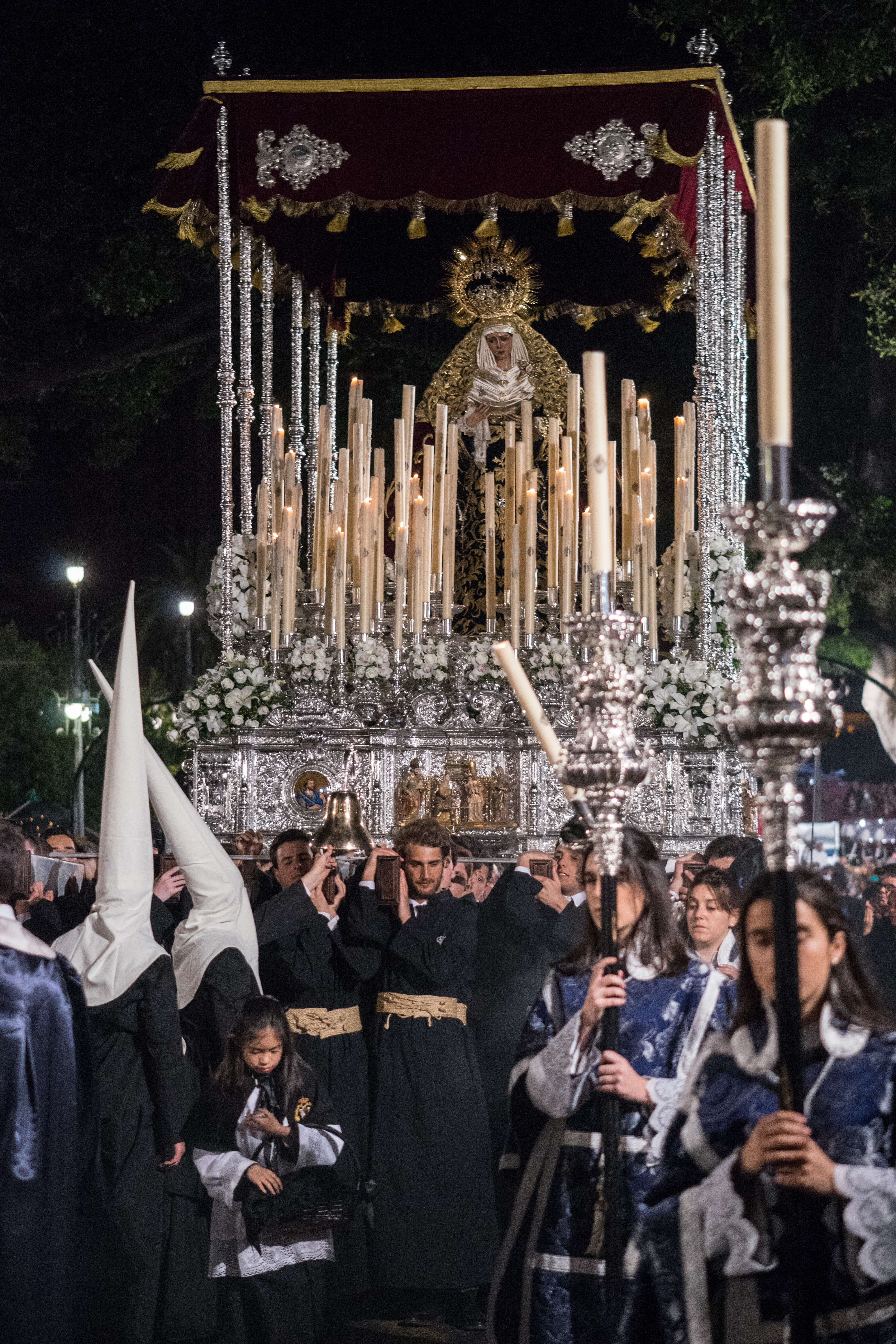 Trono de las Angustias de la Fervorosa Hermandad Sacramental y Real Cofradía de Nazarenos del Sagrado Descendimiento de Nuestro Señor Jesucristo, Nuestra Señora del Santo Sudario y María Santísima de las Angustias This is a photography of a Folklore festival in Spain (Wikidata id Q9075883).